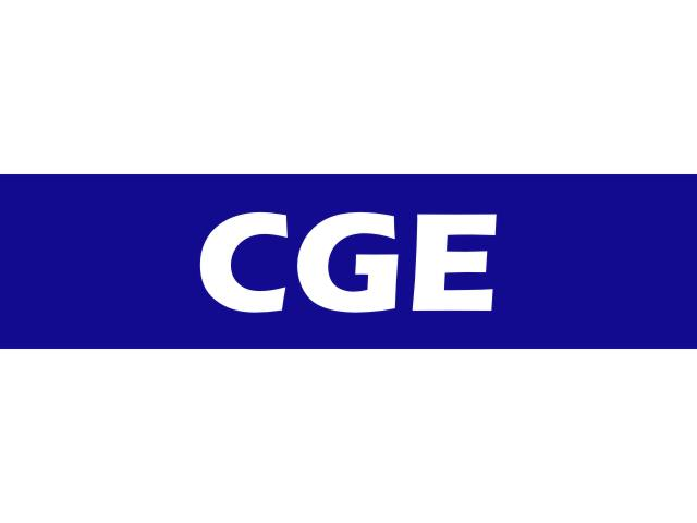 Colores del Club de Gimnasia y Esgrima de La Plata, Argentina.